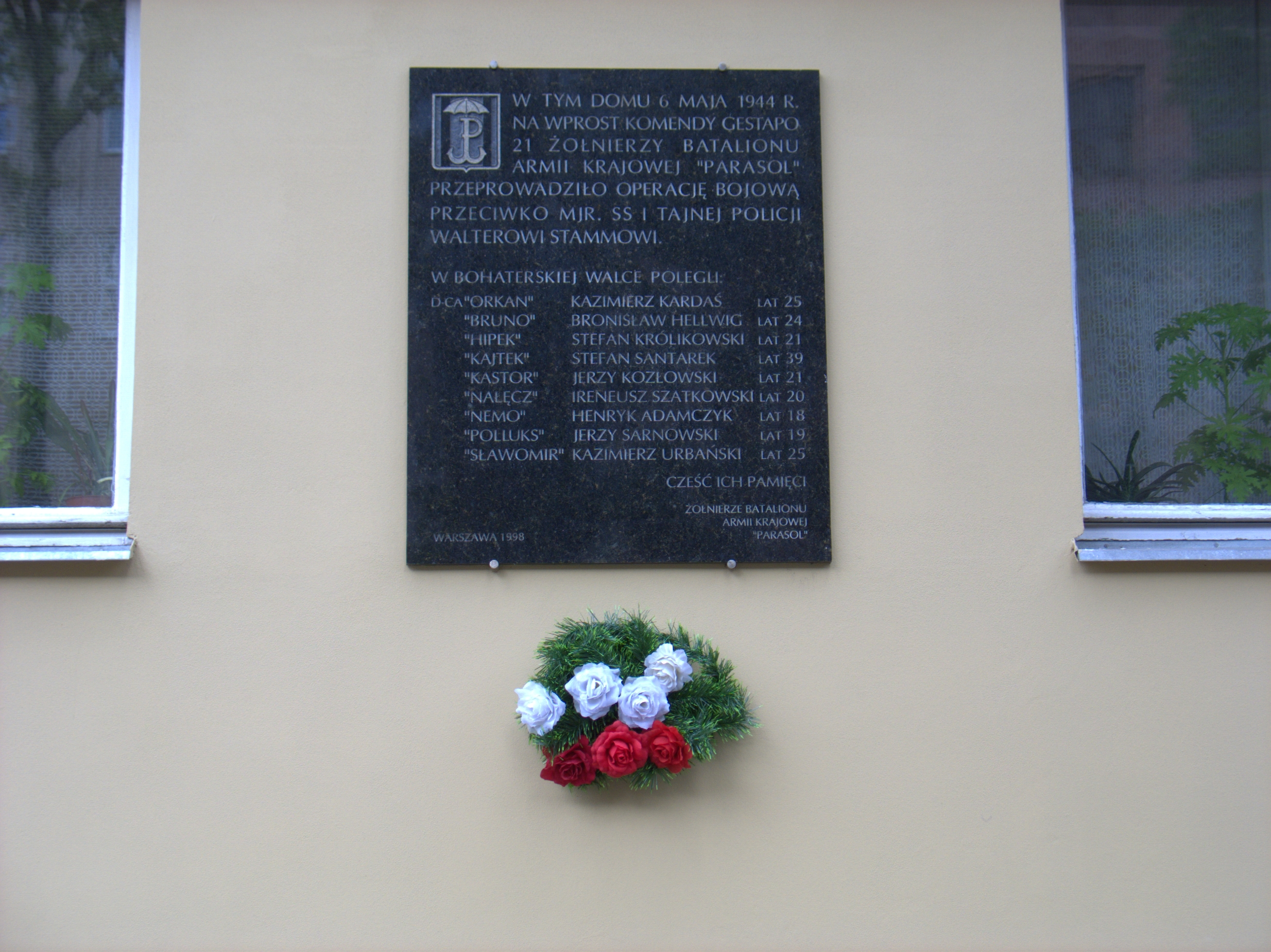 Batalion AK "Parasol" - tablica informacyjna w Warszawie